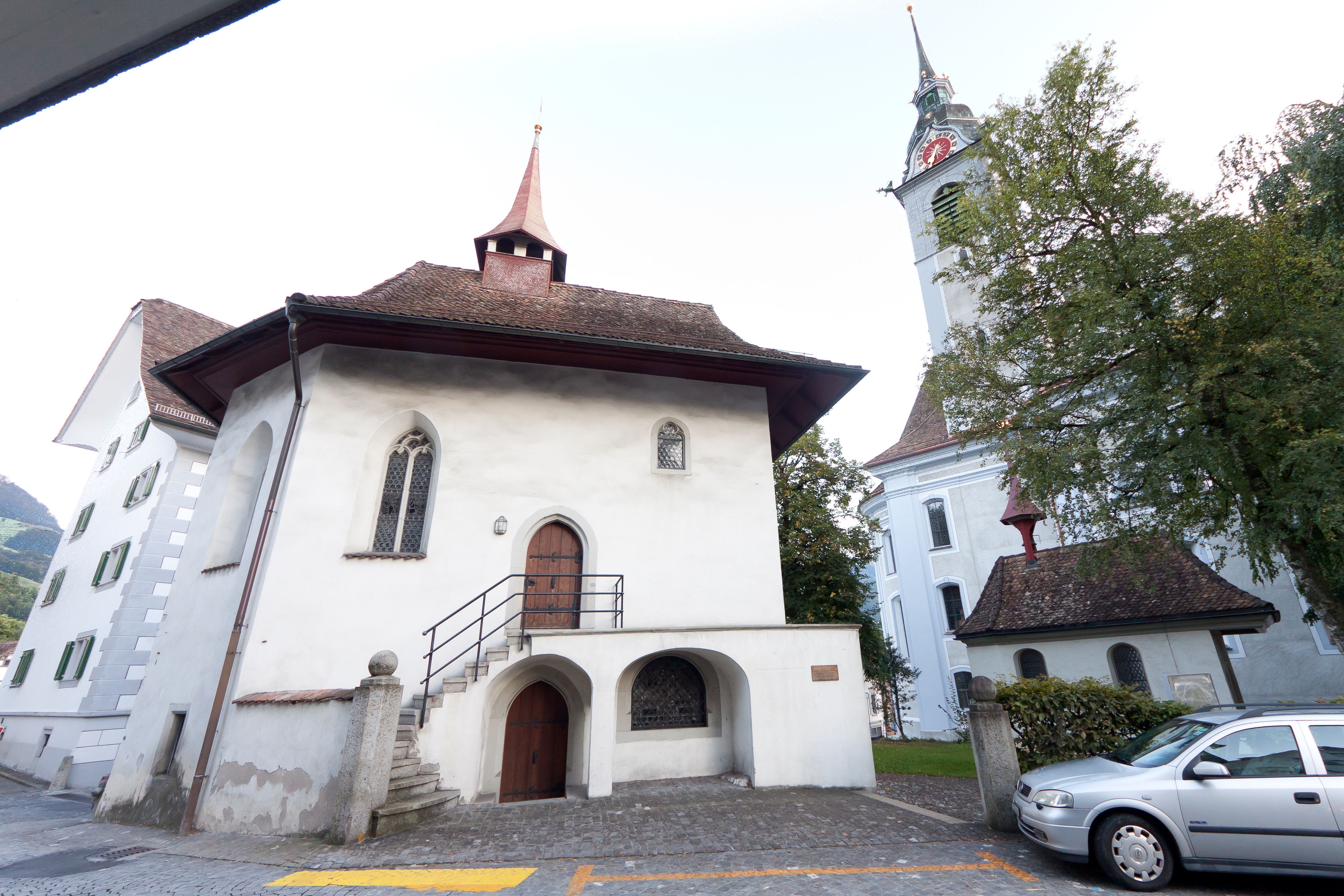 Kerchel bei Pfarrkirche Schwyz, Schulgasse, Schwyz